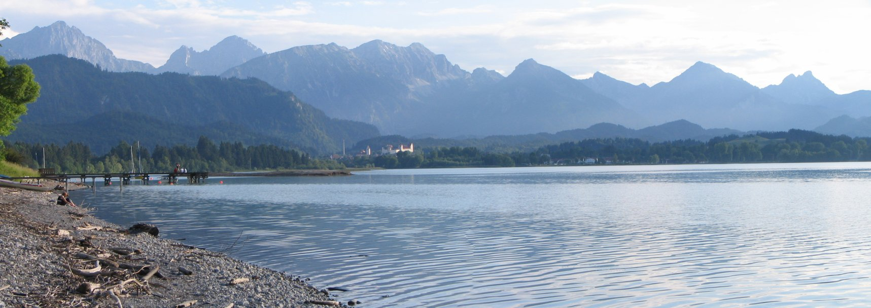 Panoramaaufnahme Forggensee mit Füssen im Hintergrund